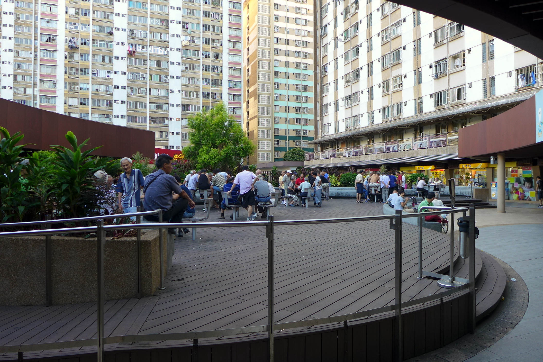 Choi Yuen Estate Open space